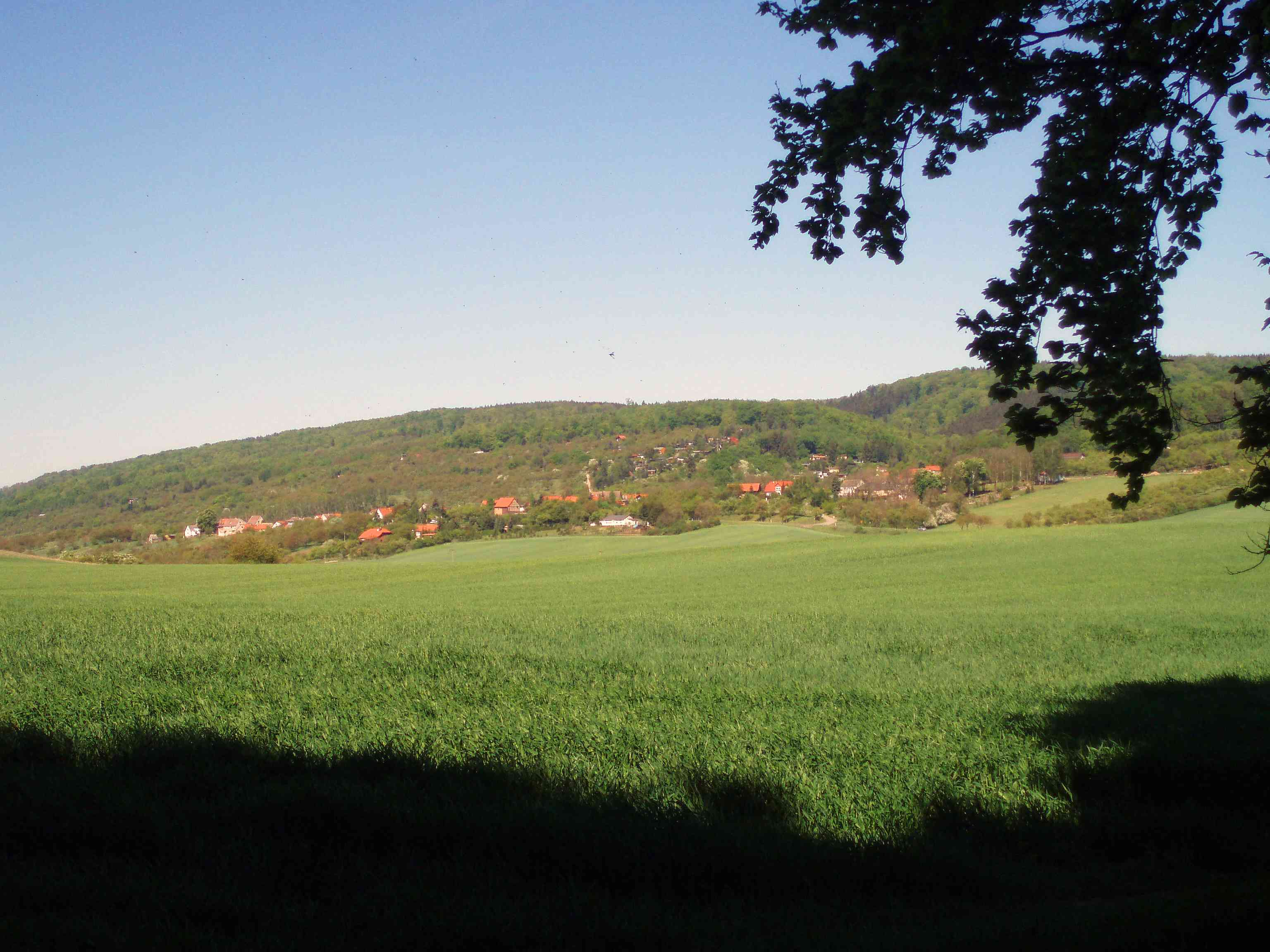 Blick auf Breitungen